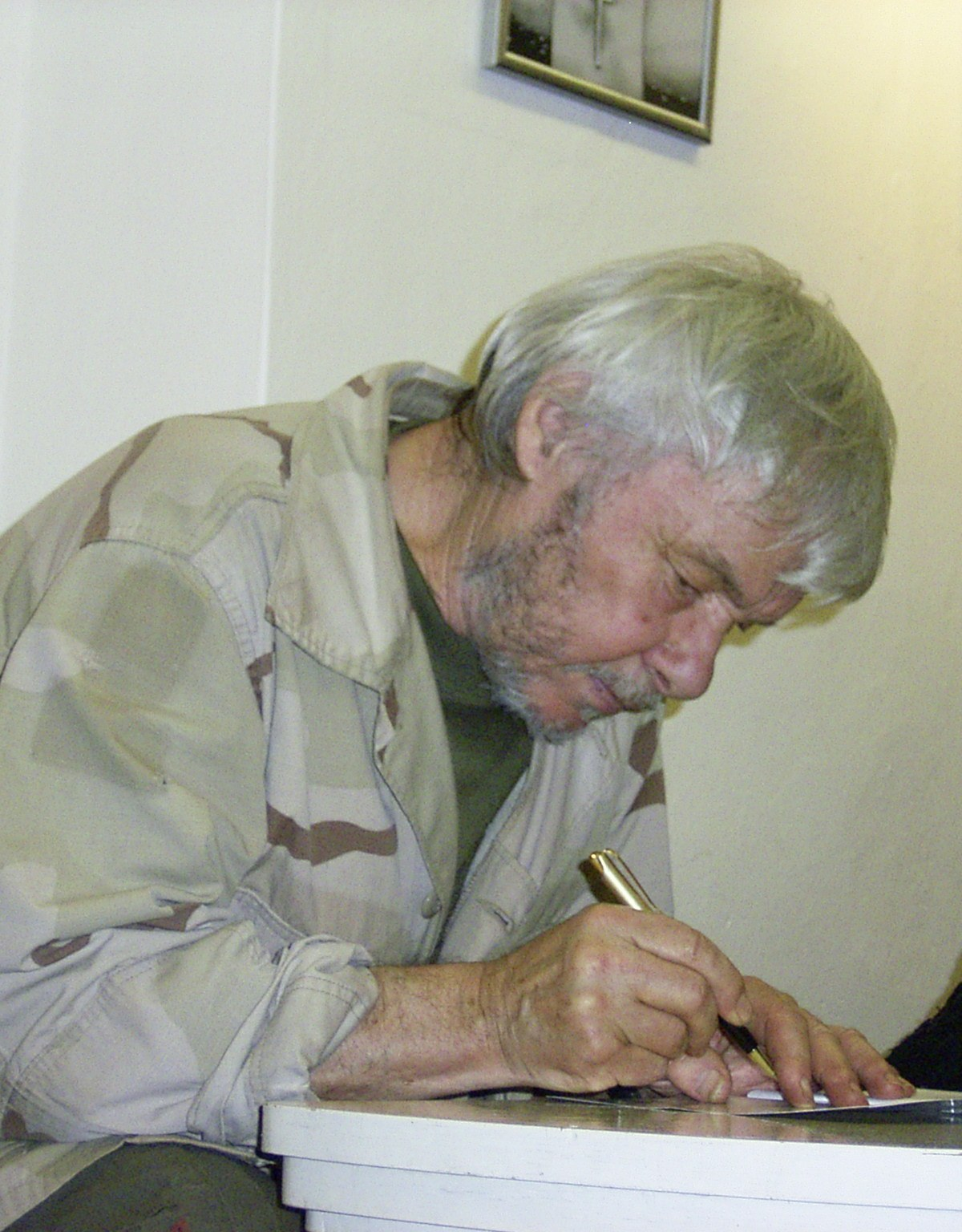 Komiksový kreslíř Kája Saudek